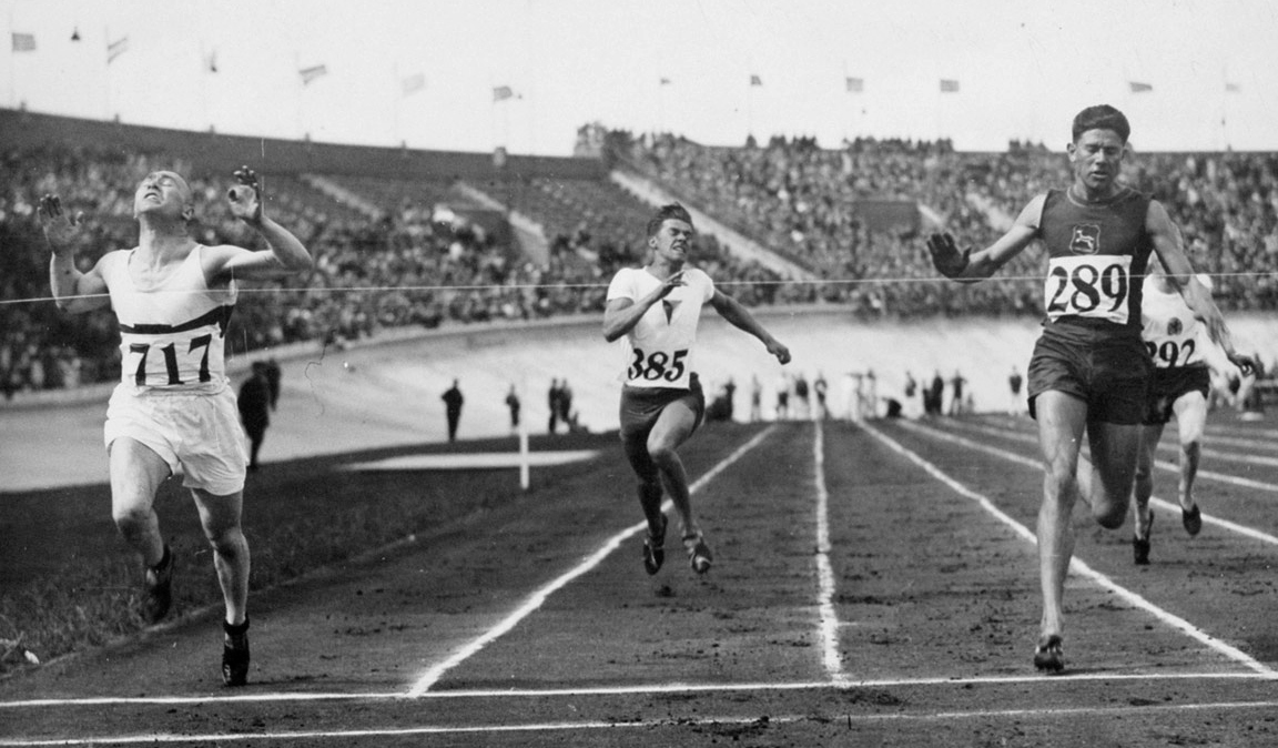 Olympische Spelen 1928 Amsterdam, Nederland : Finish van de achtste serie van de 100 meter hardlopen. De Duitser Houben (met nummer 717) wint vol overgave voor de Zuidafrikaan Viljoen.